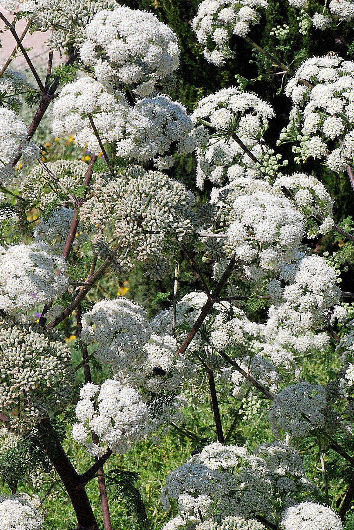 Tinguarra sicula